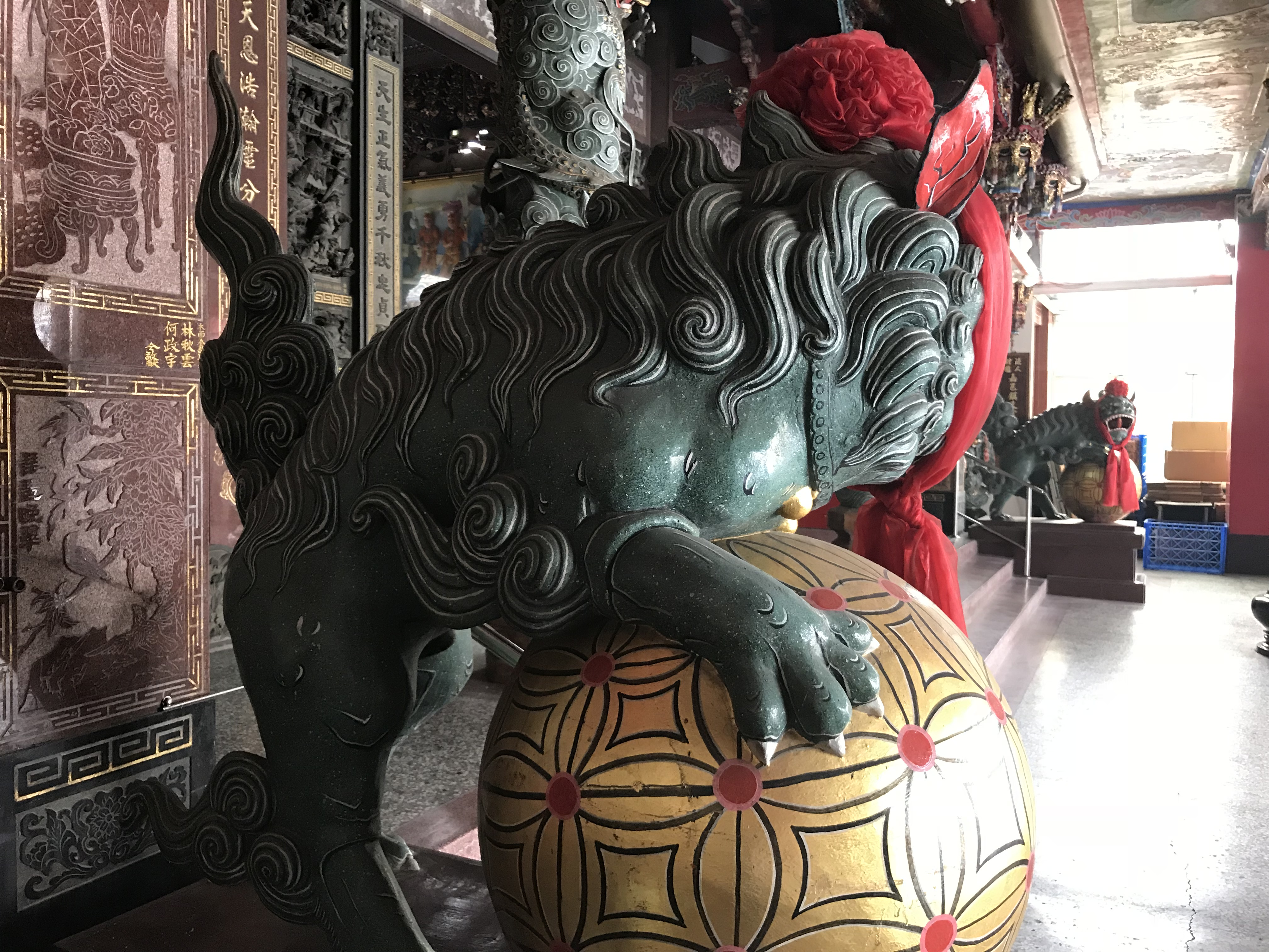 中文（台灣）: 嘉邑鎮天宮的一對公石獅。